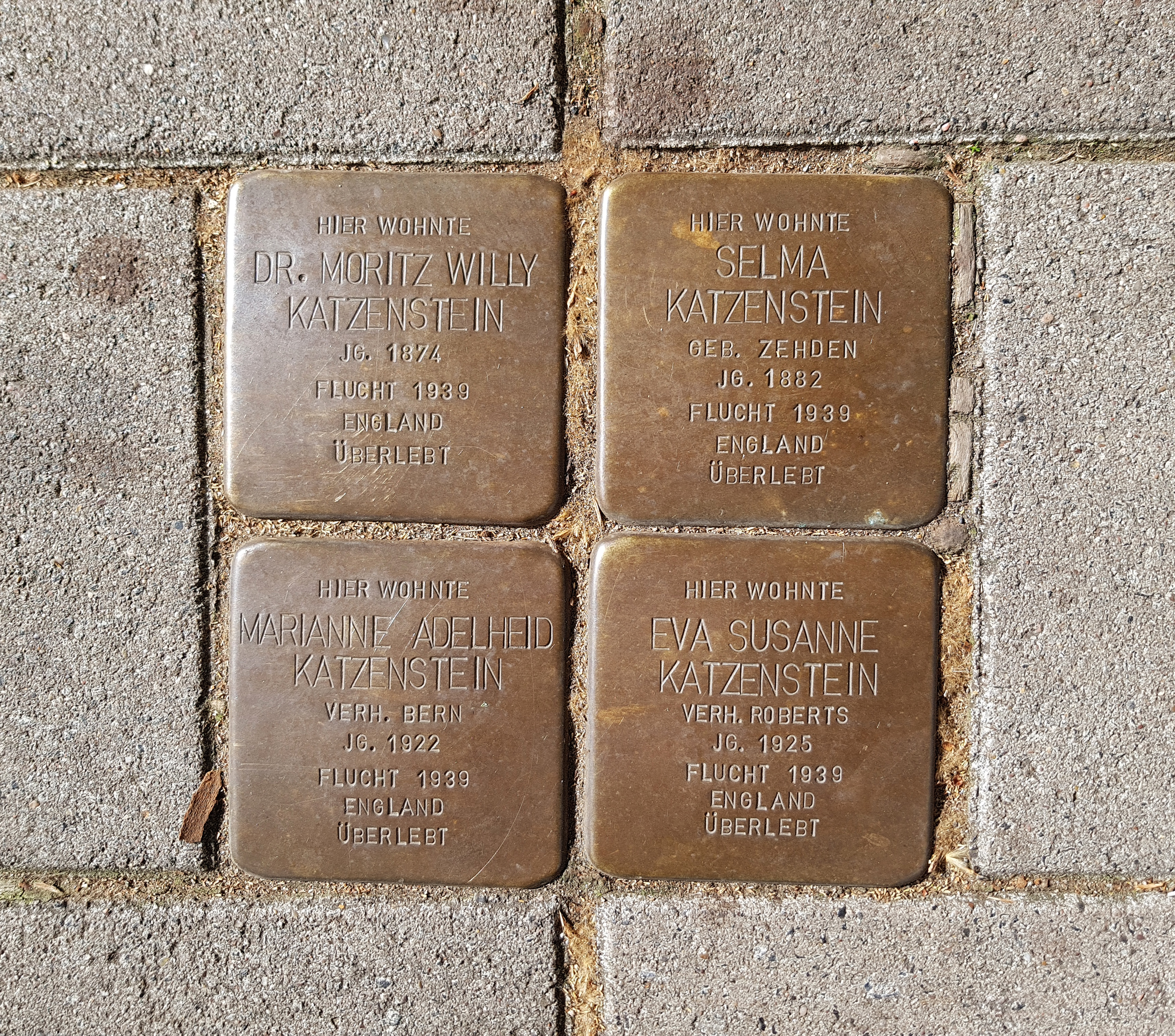 Stolperstein für Familie Dr. Willy Katzenstein Viktoriastr Bielefeld